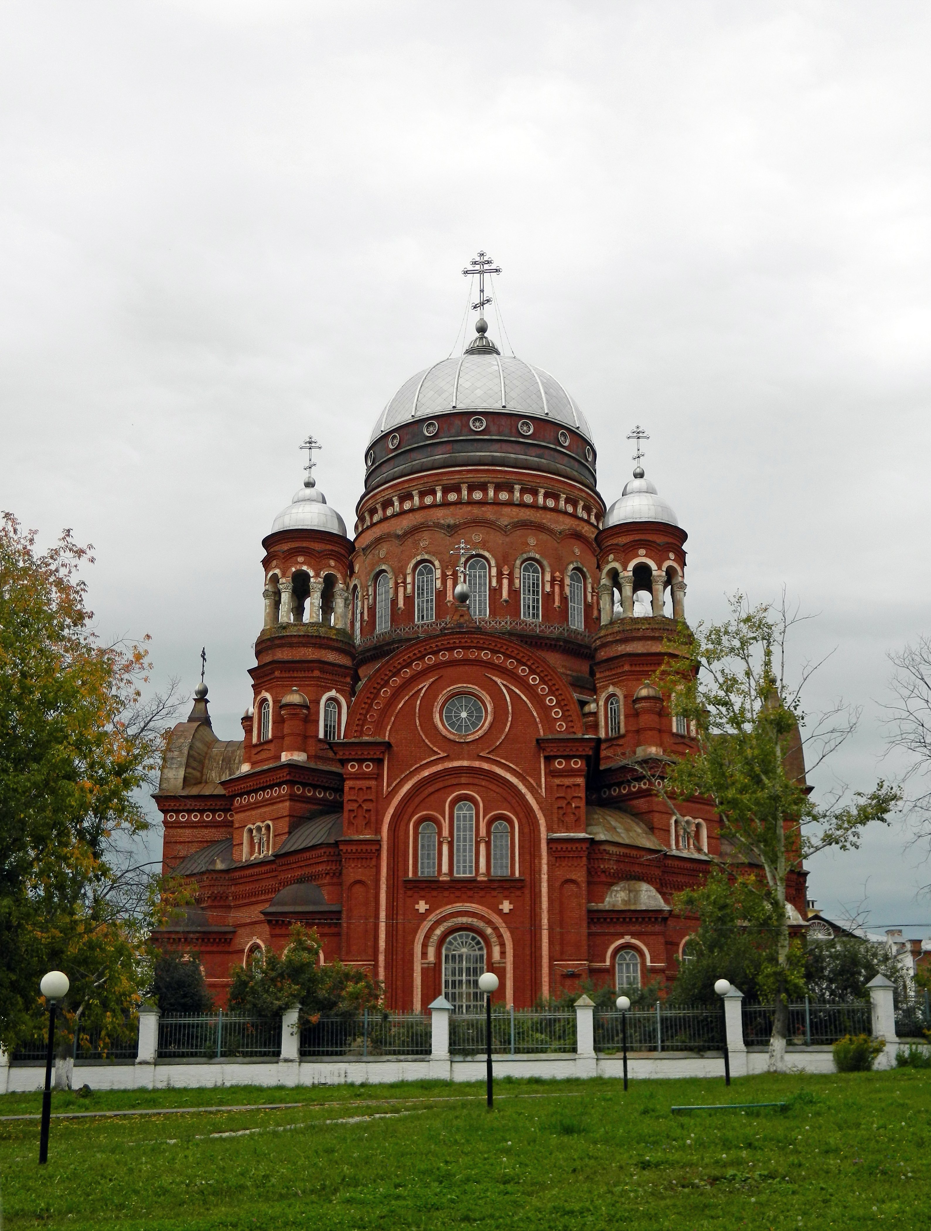 Троицкий собор с интерьером: улица Советская, 34, Уржум, Уржумский район, Кировская область